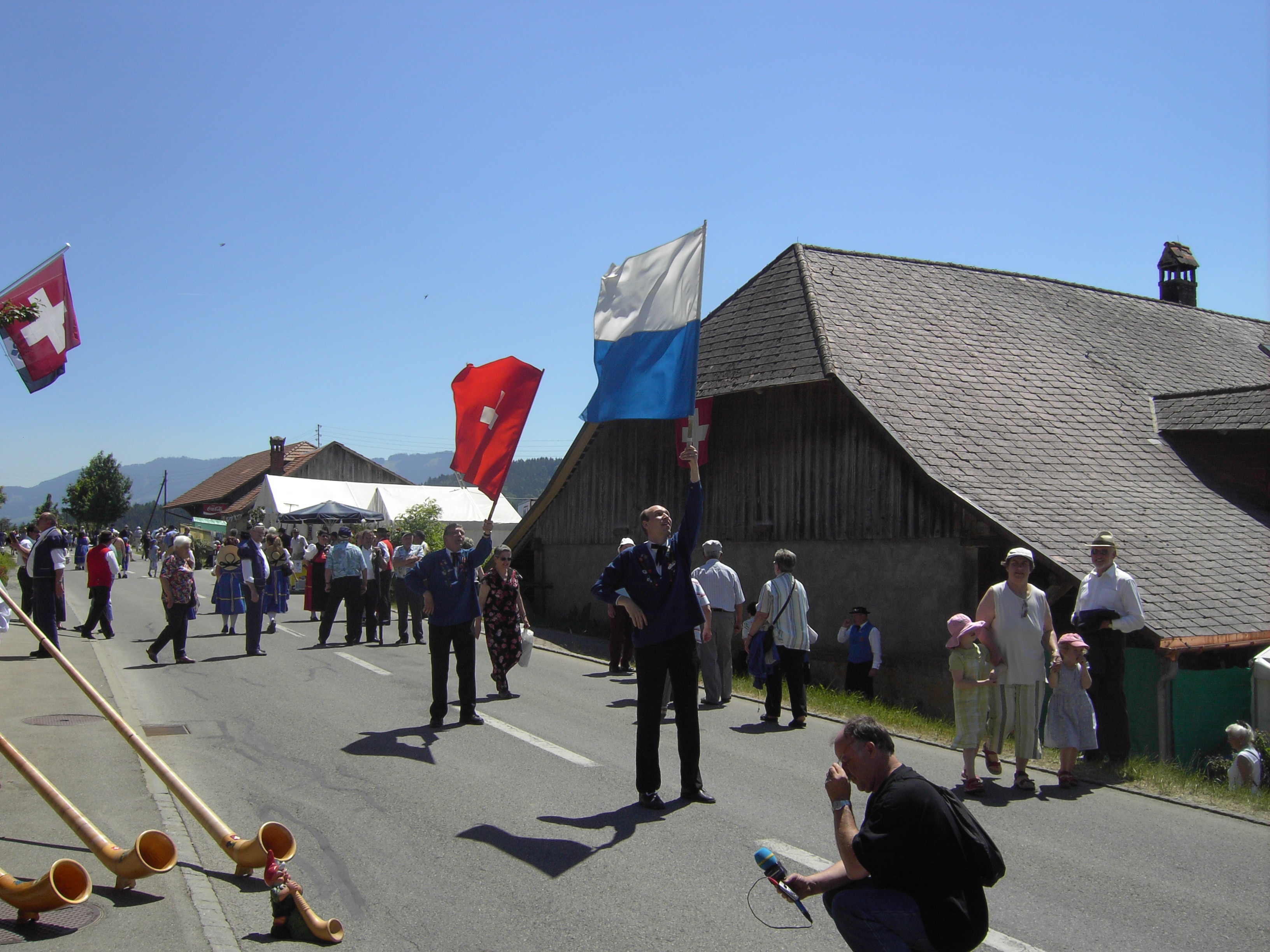 Umzug beim Westschweizer Jodlerfest 2006 in Rechthalten FR, Schweiz